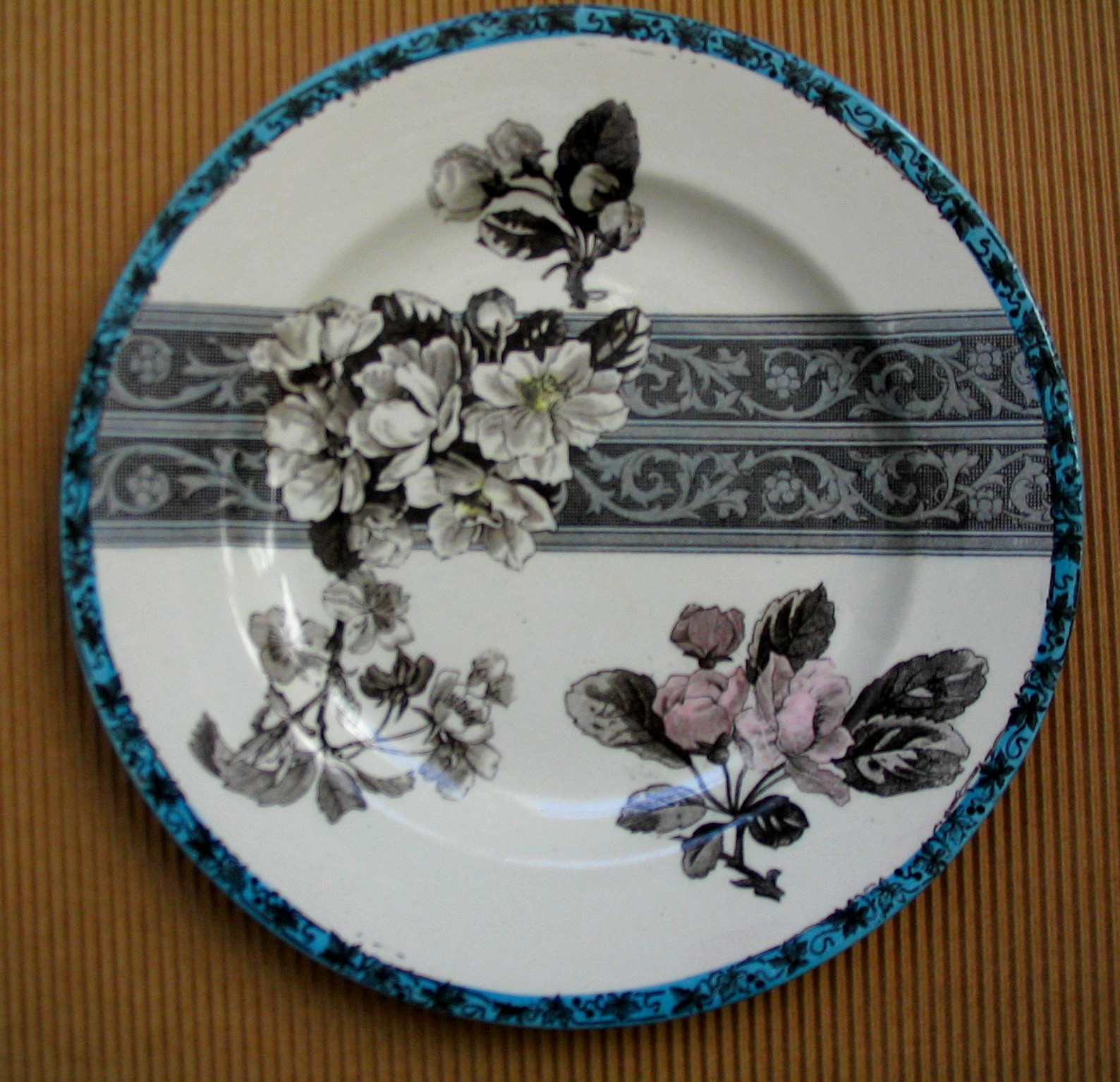 Assiette en faïence imprimée de Choisy-le-Roi, fin XIXe siècle, France